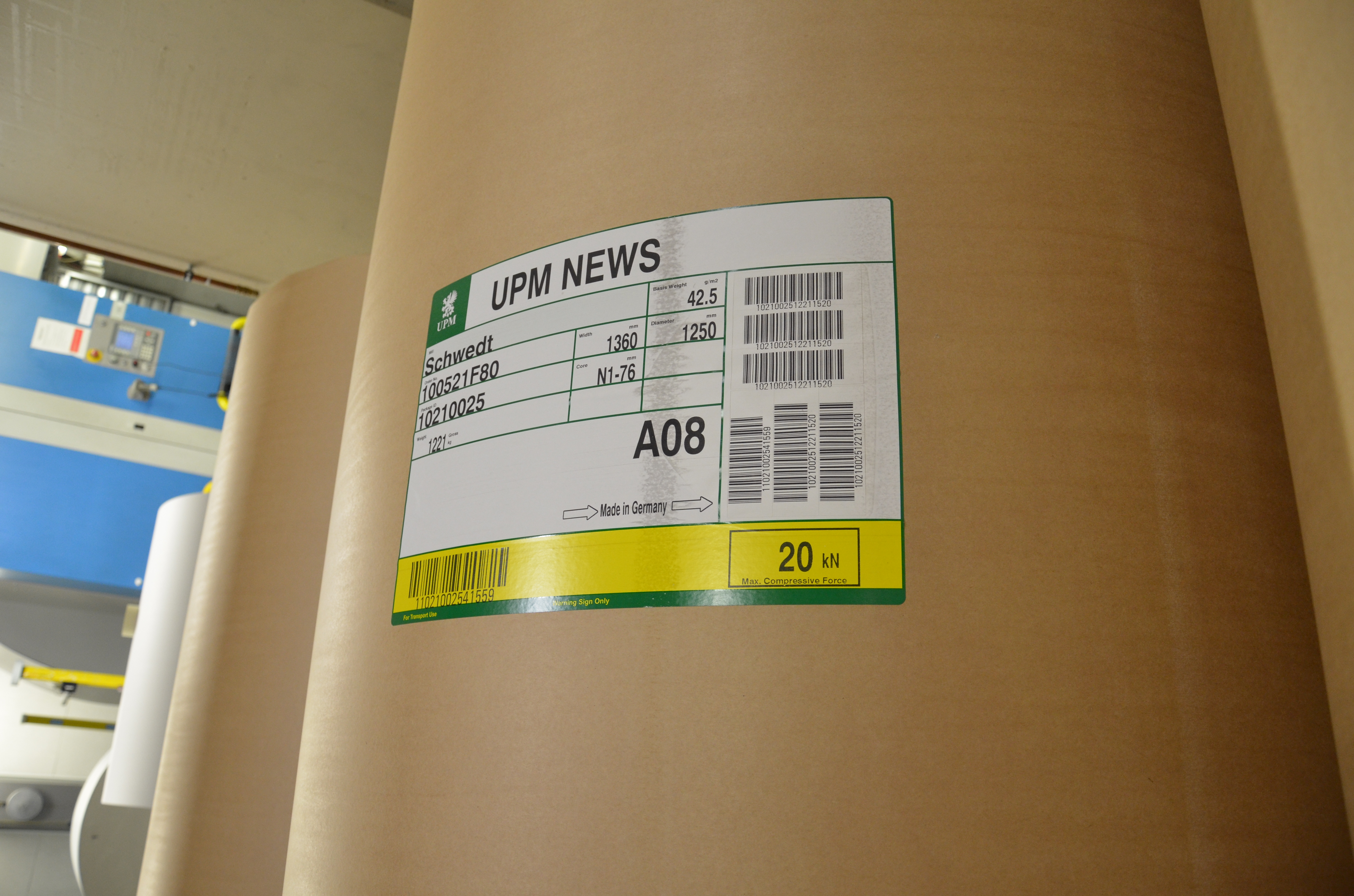 Druckhaus der WAZ Mediengruppe in Essen: technische Daten des Zeitungspapiers.